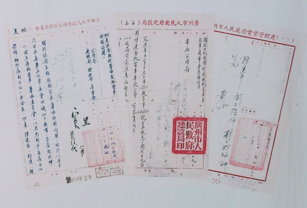 粵語: 1951年，广州市人民政府同有关部门批准起电车嘅公文。